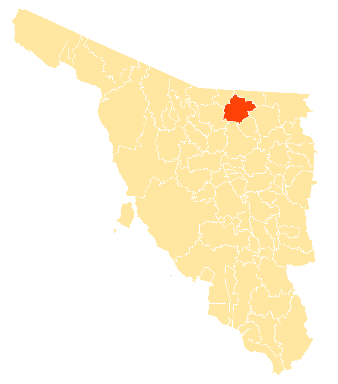 Municipio en Sonora, México.